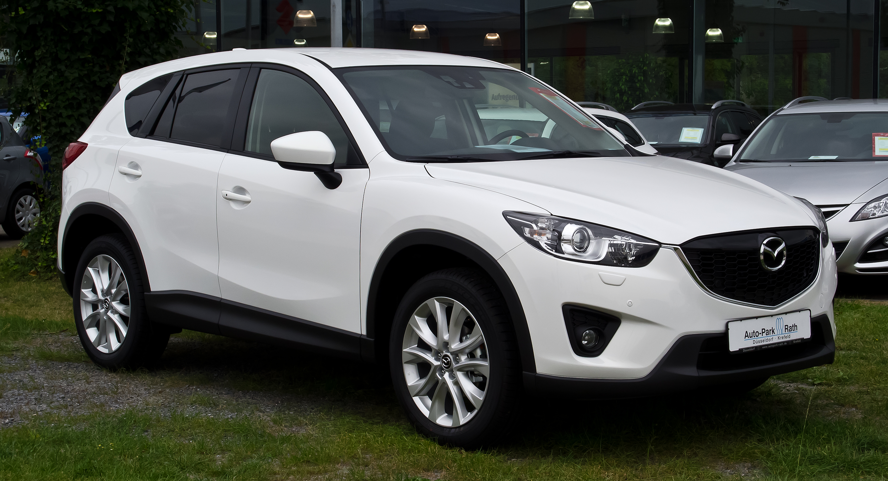 Mazda CX-5 2.0 SKYACTIV-G AWD Sports-Line